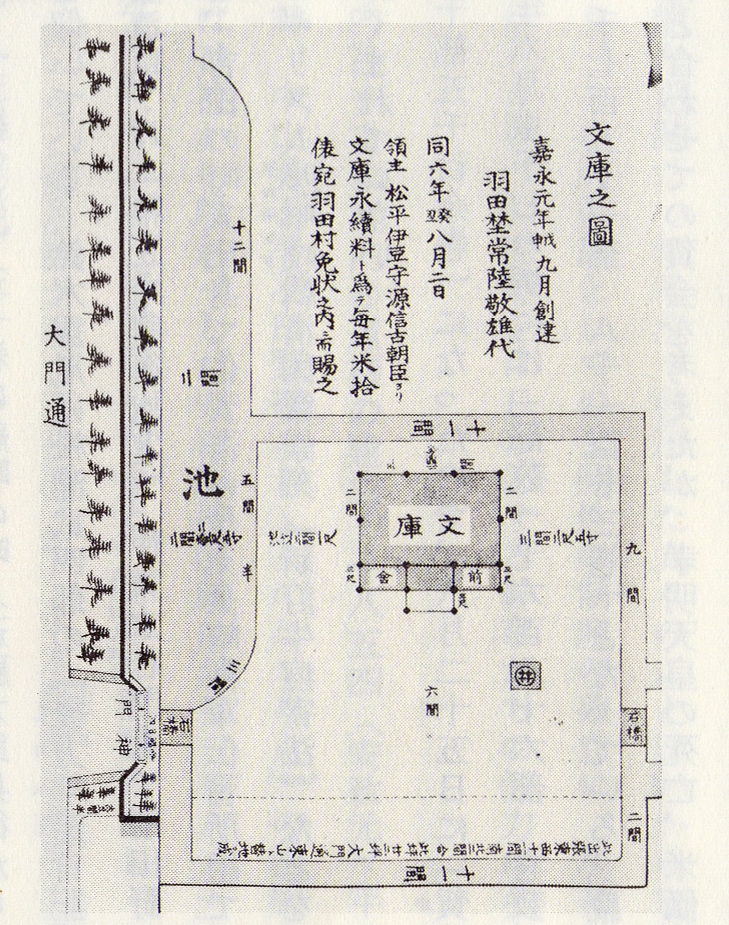 『文庫之図』（豊橋市中央図書館蔵） 1848年創建の羽田八幡宮文庫の平面図